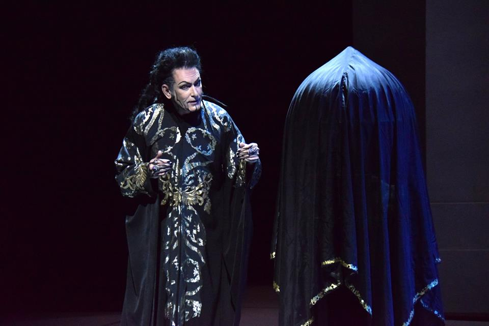 Звездочет «Золотой петушок» Геликон- Опера (27.06.18)